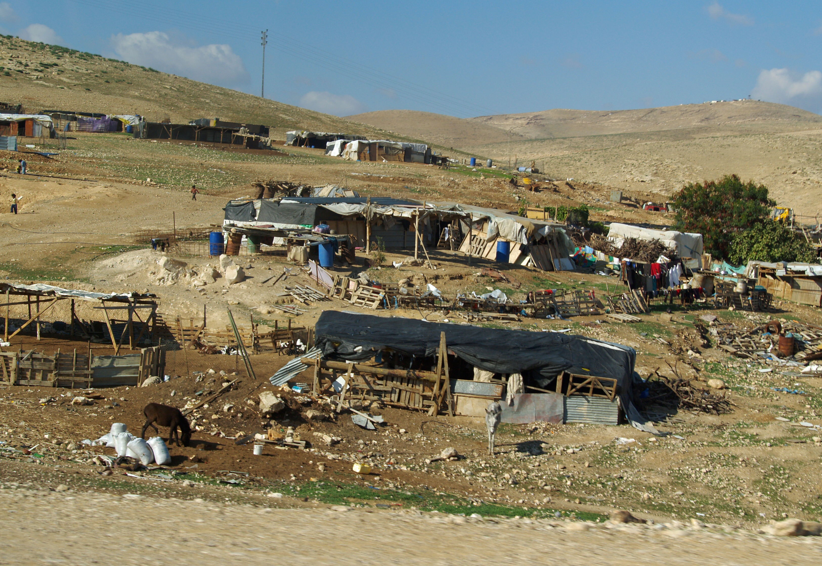 Judean bedouin village